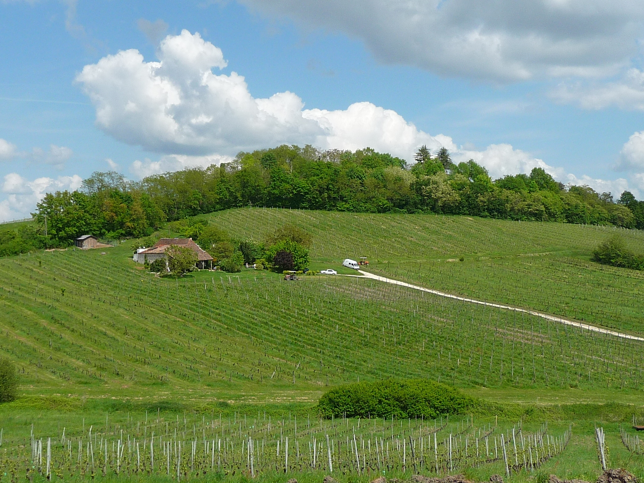 Vignoble des côtes-de-bergerac